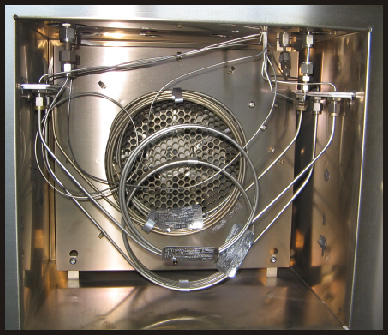 chromatograf. kolona